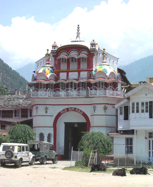 Raja Rupi Kulu Palace, Kullu, Himachal Pradesh, India